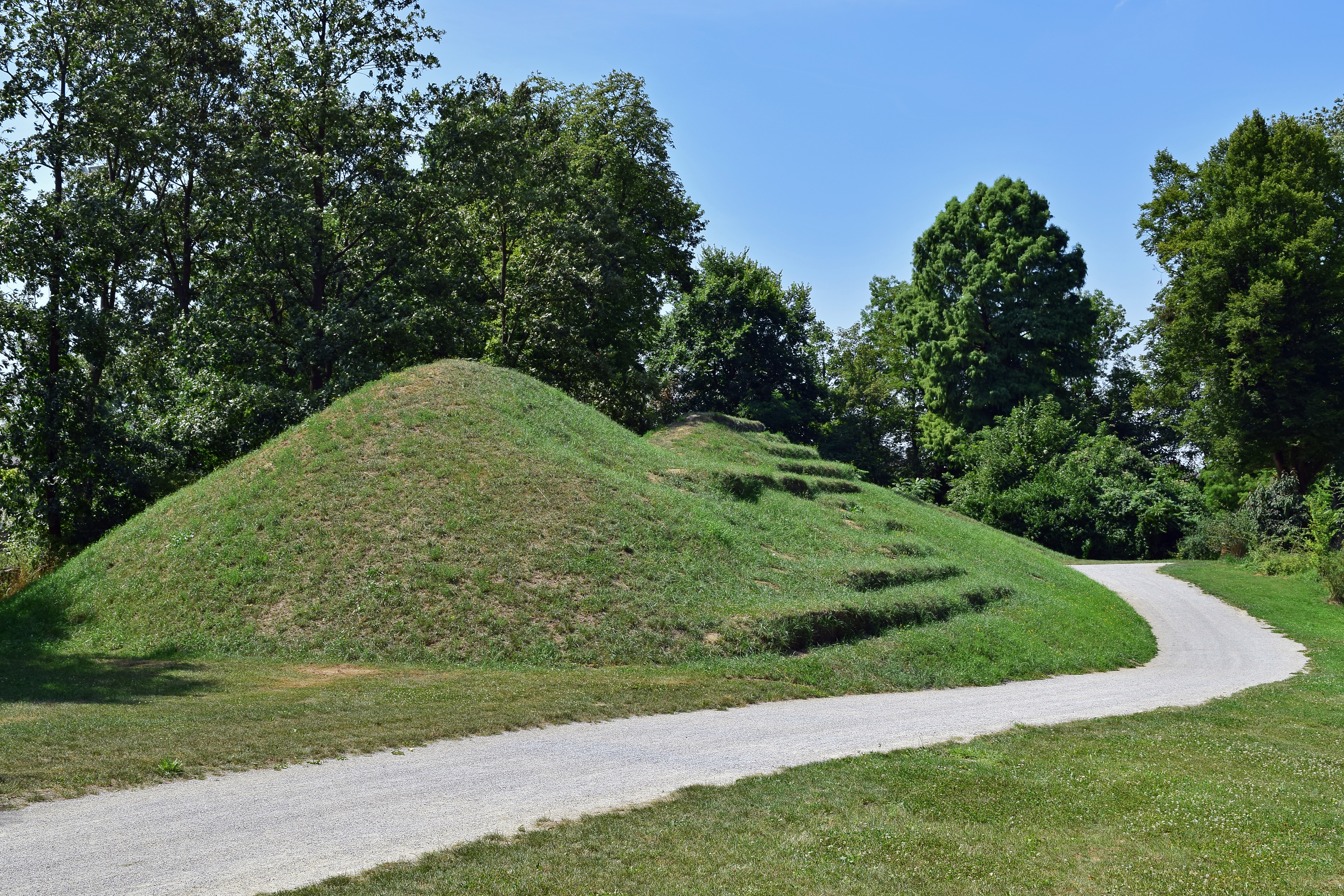 Installation Mountain von Maider López, 2013, für den Schlosspark Grafenegg